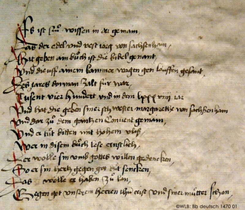 Mentelin-Bibel, 1. vorlutherische Bibel in deutscher Sprache, Druck von Johannes Mentelin in Straßburg, 1466, Württembergische Landesbibliothek, Signatur: Bb deutsch 146601. – Jörg von Sachsenheim erwarb die Bibel von dem Dominikanerinnenkonvent St. Margaretha und St. Agnes in Straßburg. Das nach Blatt 406 in der Bibel eingehängte, stark beschnittene Blatt enthält ein Gedicht, mit dem er die Bibel 1489 seiner Schwester Margarethe von Sachsenheim und ihrem Konvent in Lauffen am Neckar schenkte: „… iörg von sachsenhain hat geben ain buoch ist die bibel genant vnd … gen Louffen gesant … tusent vier hundert vnd in dem lxxxviiii iar … siner schwester margarethe von sachsenhain und dar zuo dem gantzen Conuent …“